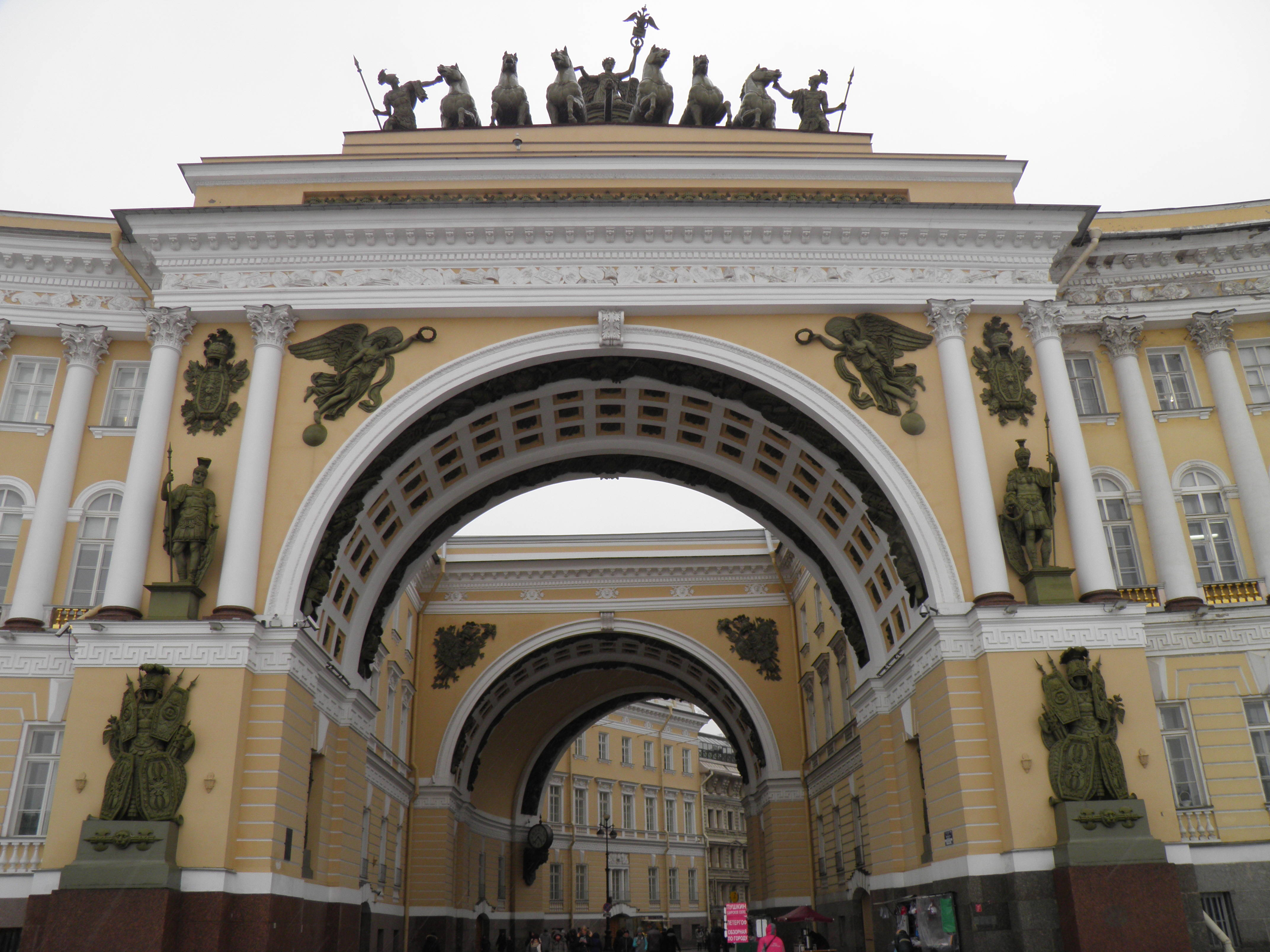 Arche de l'état-major général à Saint-Pétersbourg (Russie).